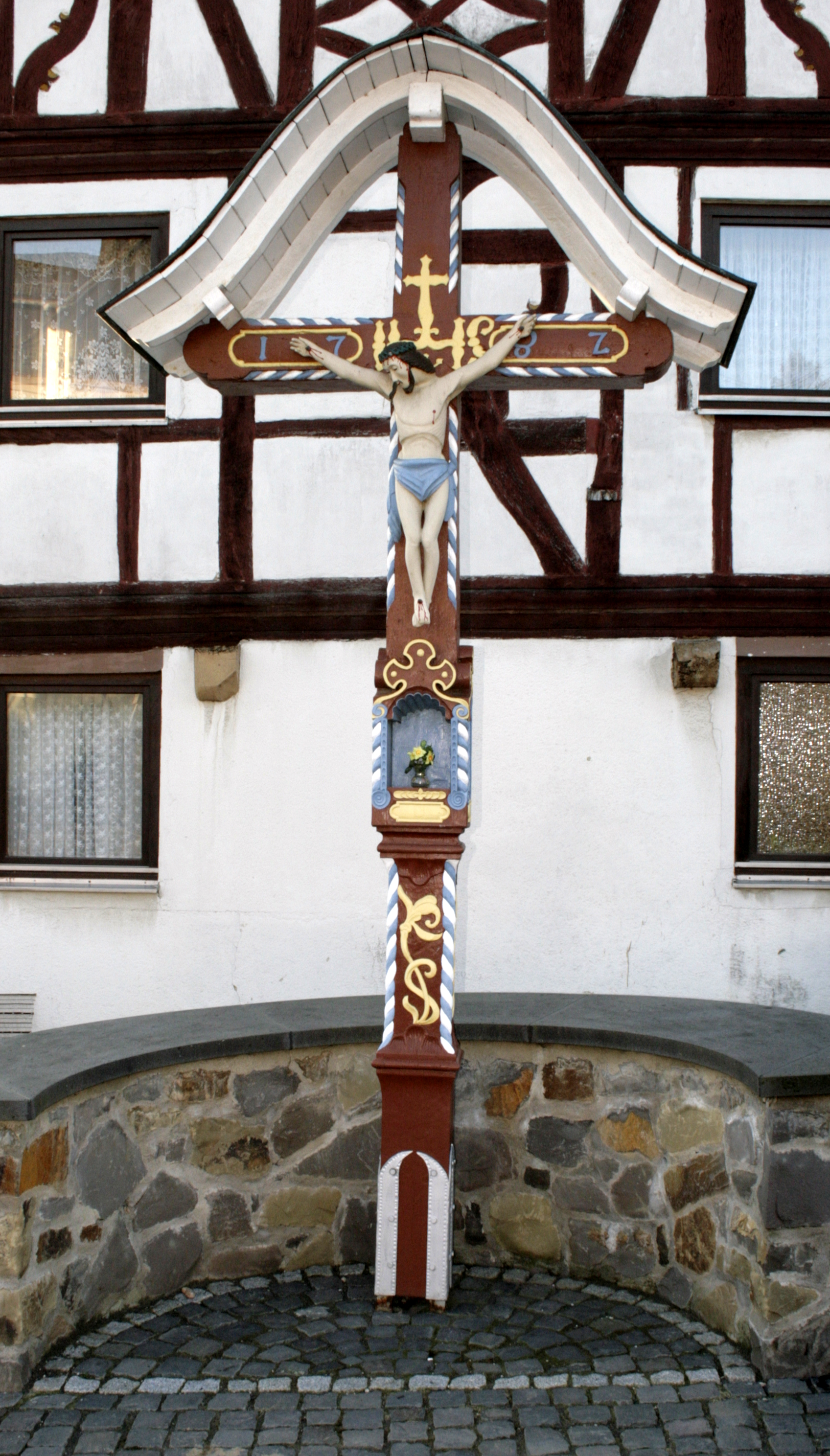 Kruzifix am Brunnenplatz in Hadamar-Niederzeuzheim, Deutschland